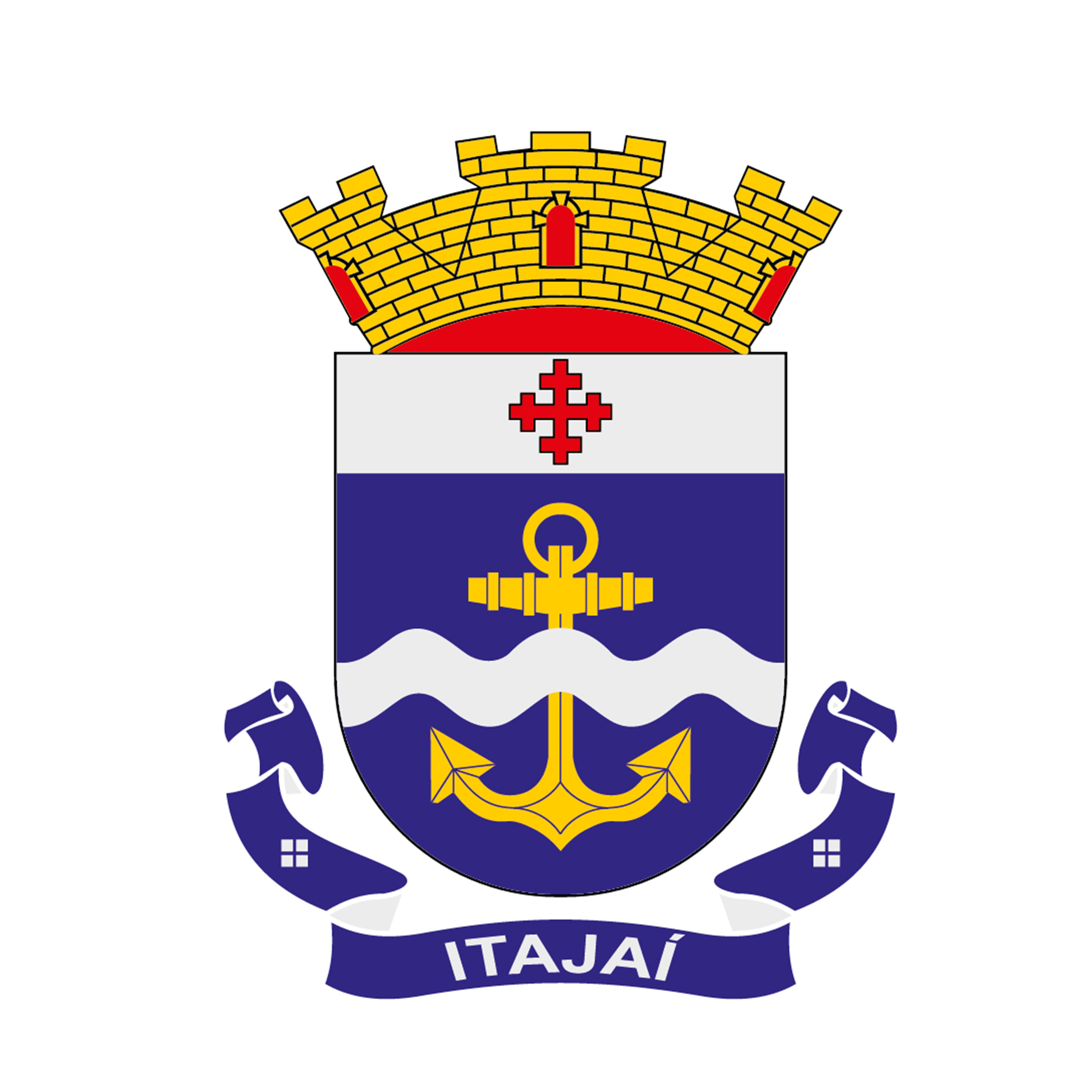 Brasão Oficial do Município de Itajaí - SC